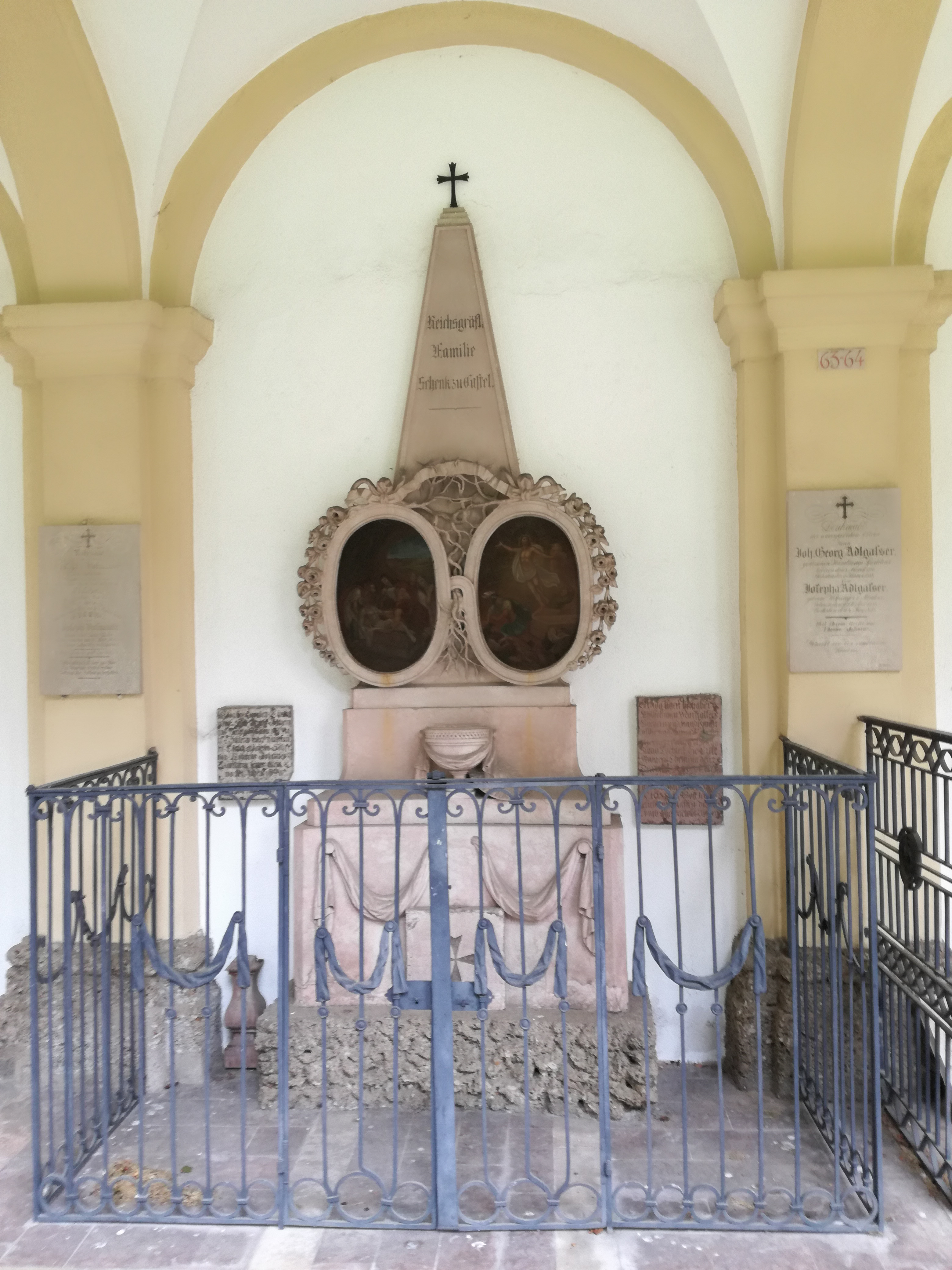 Gruft Nr. 63 Sebastiansfriedhof Salzburg